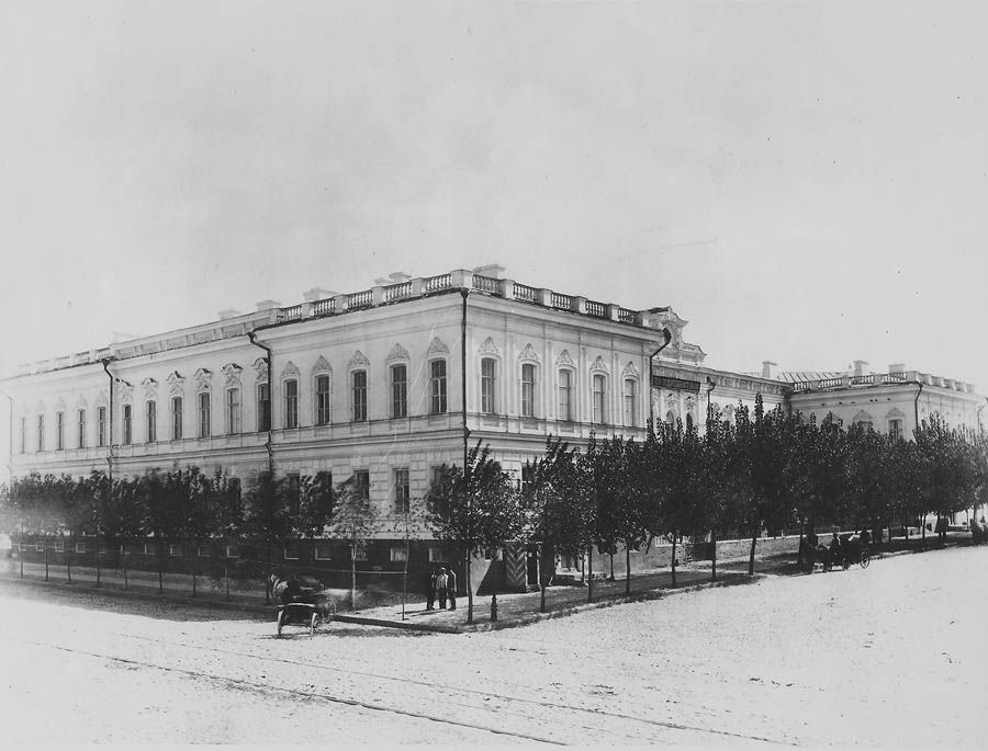 Старый Ростов-на-Дону. Здание банка